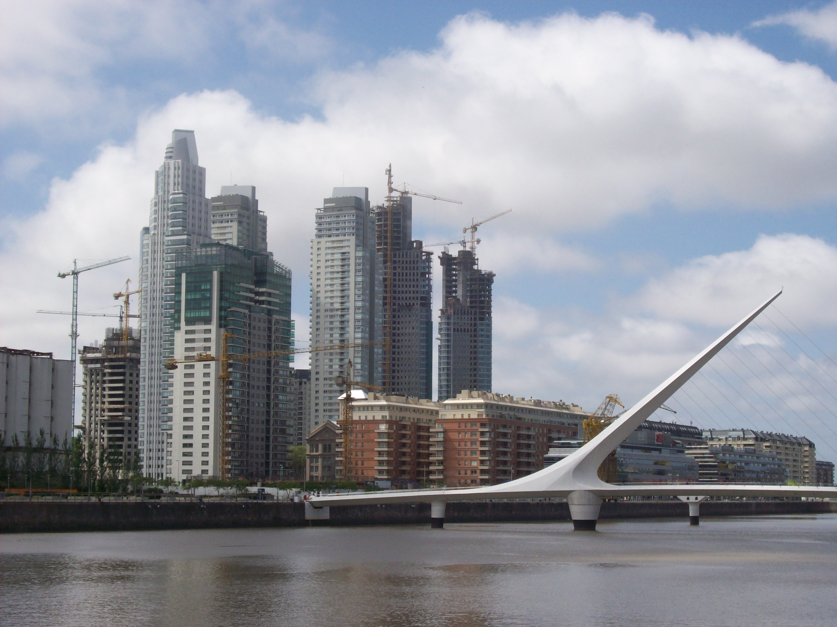 Construcciones en Puerto Madero, Buenos Aires. Adelante se ve el Puente de la Mujer.